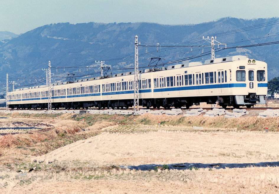 小田急電鉄 4000形電車 4555 普通 開成駅 - 栢山駅間